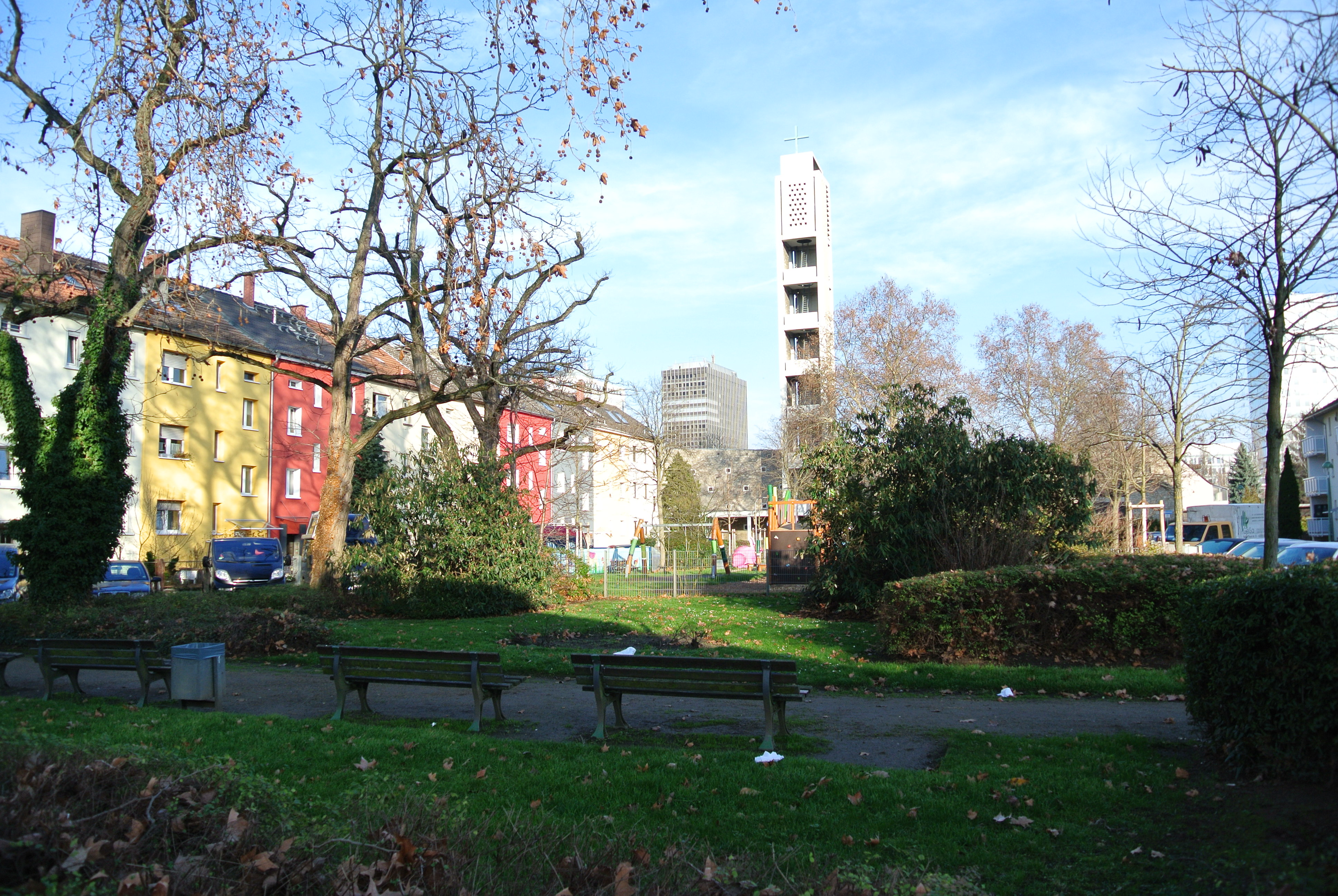 Kuhwaldsiedlung in Frankfurt-Bockenheim; 1919-1922; Heimstätte; Friedrich-Naumann-Straße, zentraler Platz mit Dreifaltigkeitskirche